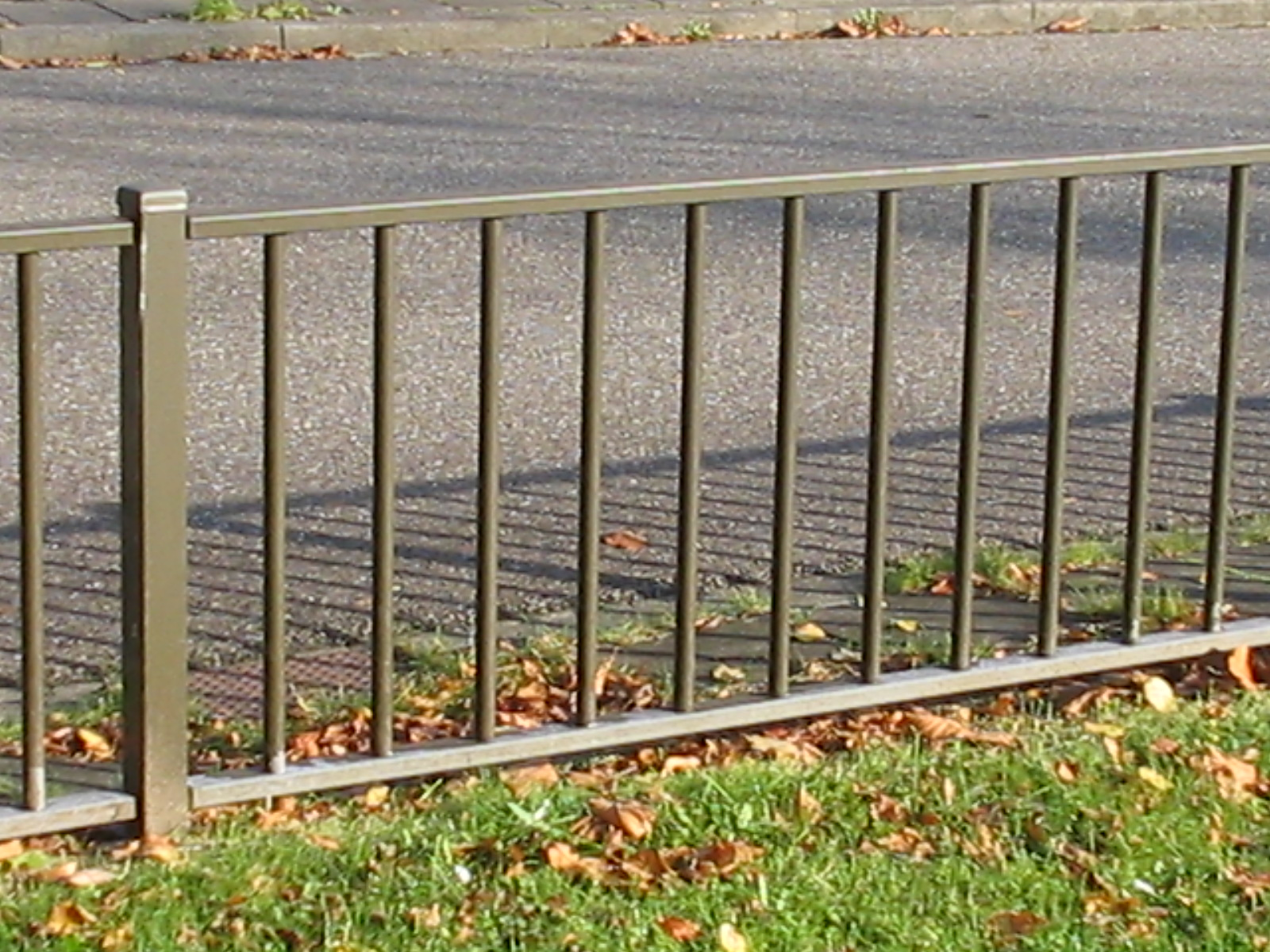 een eenvoudig hek